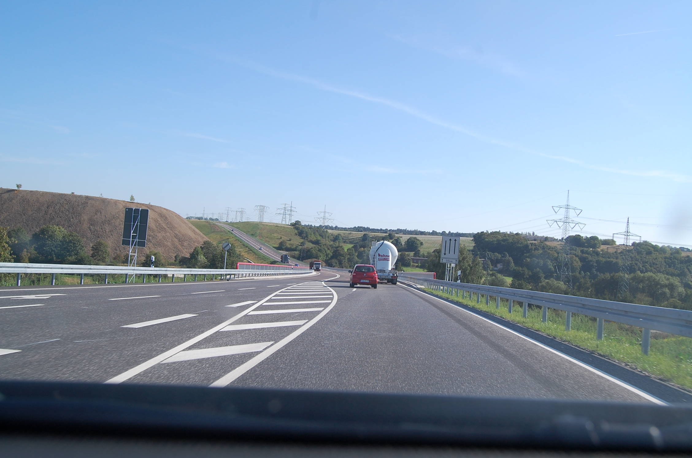 B180-Brücke über die Wipper bei Mansfeld mit Zusatzfahrstreifen